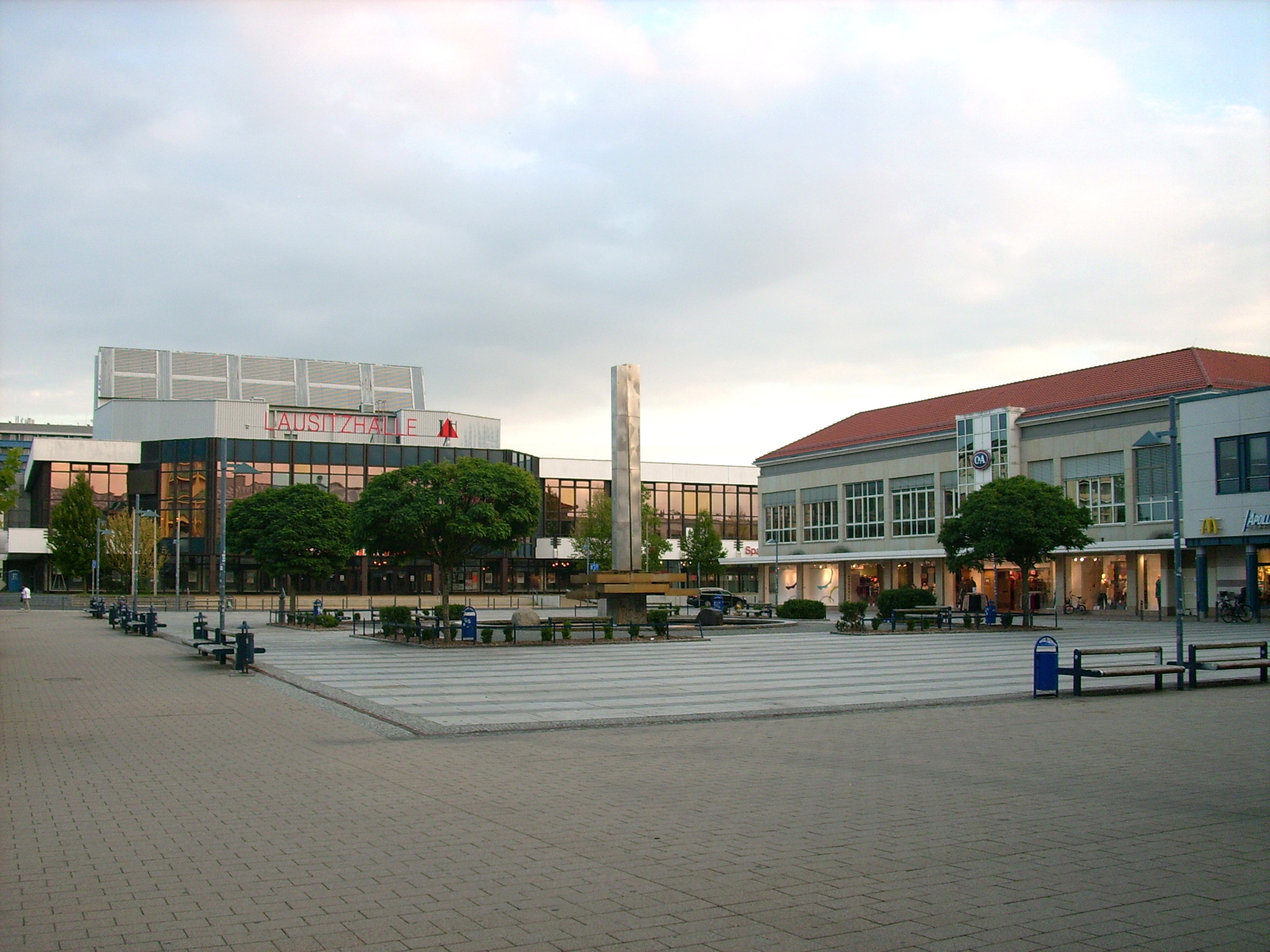 Lausitzer Platz in Hoyerswerda